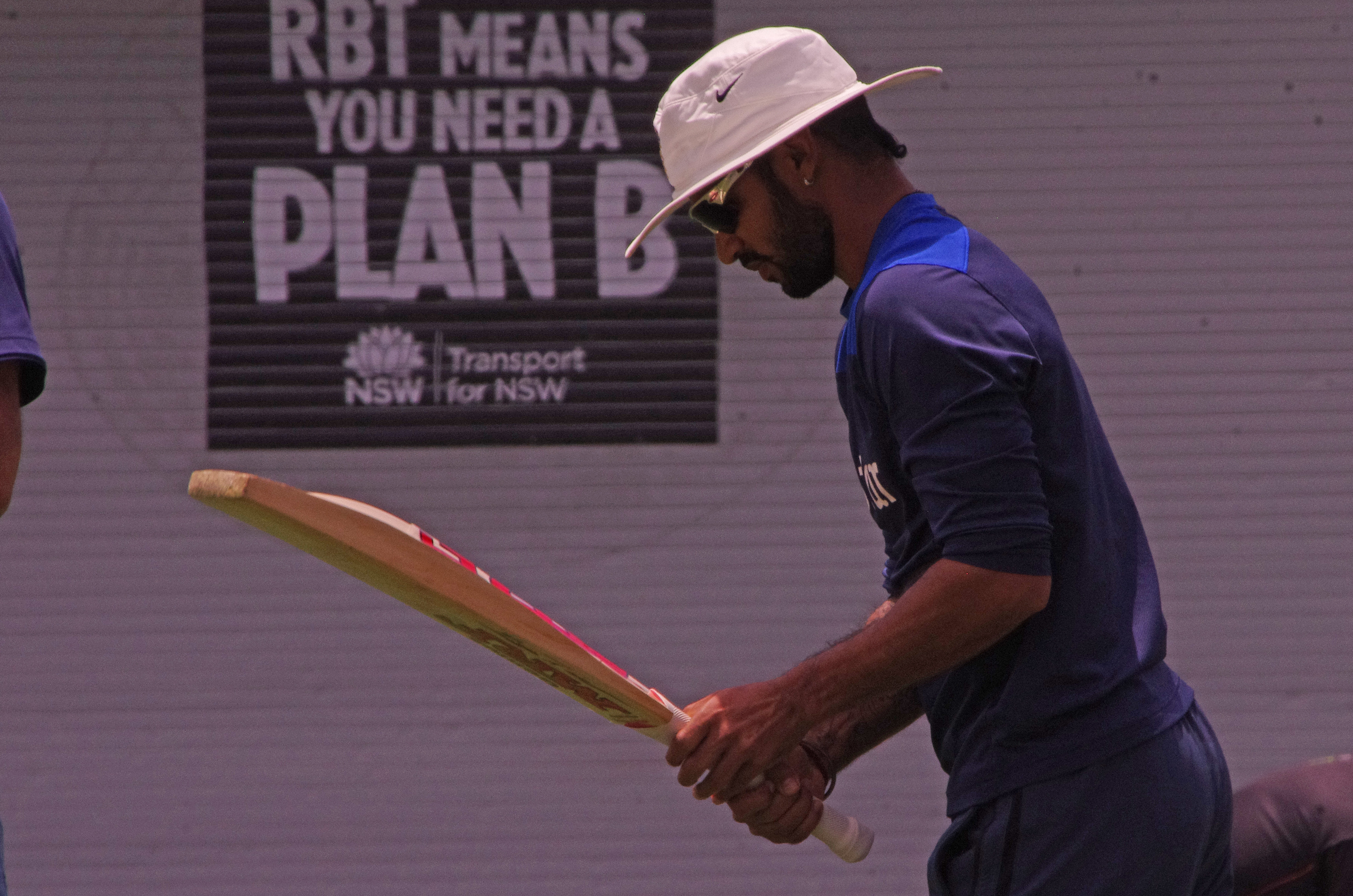 SHIKHAR DHAWAN